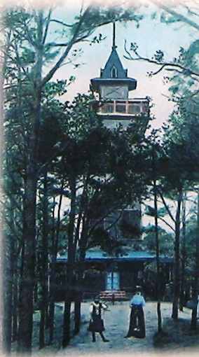 Ehemaliger Kron-Prinz-Friedrich-Wilhelm-Turm auf dem Kranichsberg - aufgenommen auf einer Schautafel des Müggel-Spree-Parks